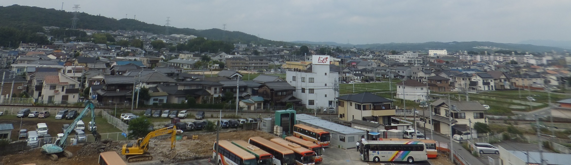 兵庫県三木市平田遠景